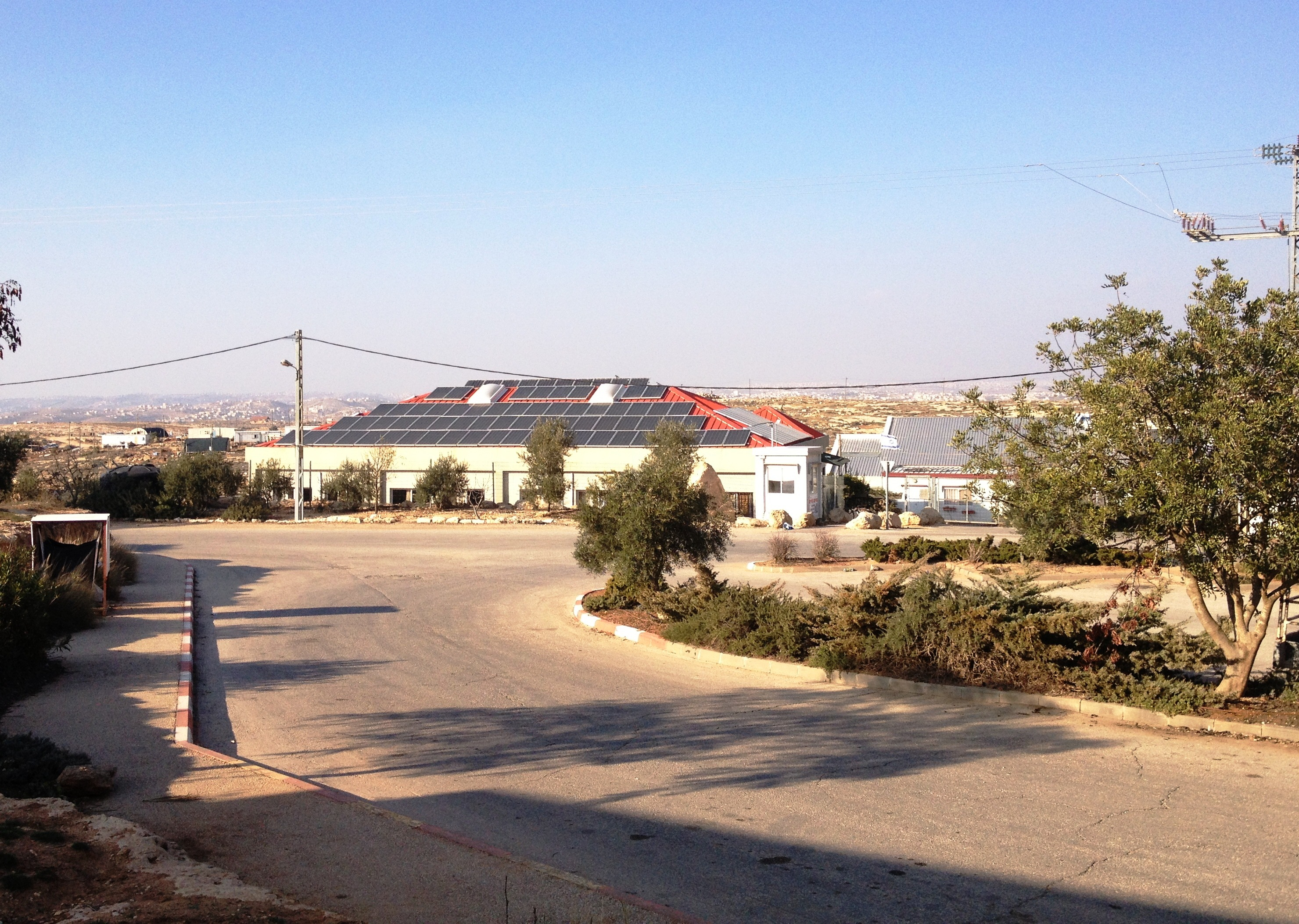 סוסיא חשמל סולארי